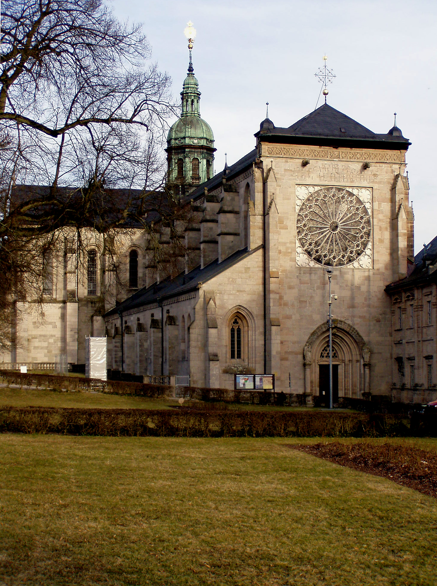 Die Westfassade der ehemaligen Klosterkirche von Ebrach/Oberfranken